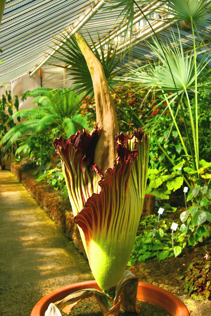 Die Pflanzen blühen im 2 bis 3 Jahresrhythmus. Blütenstände im Jahr 2000, 2003, 2006, 2008, 2009, 2010, 2011, 2012 und 2015